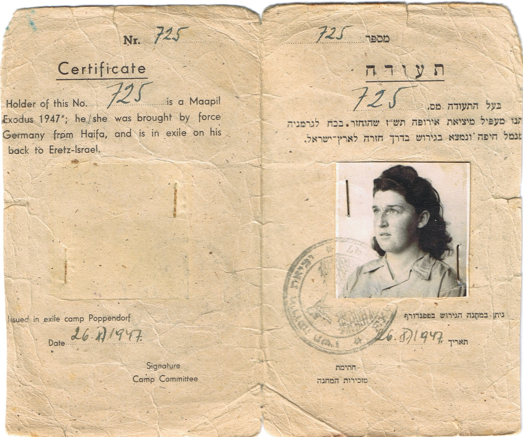 ב-18 ביולי 1947 גורשה האונייה "אקסודוס" מנמל חיפה. ב-26 ביולי 1947 ניתנה תעודה מס' 725 להניה דוידוביץ, ( לאחר מכן הניה דוד), על ידי מזכירות מחנה הגרוש פפנדורף בצפון גרמניה. המחנה שכן ליד העיר ליבק (Lübeck)